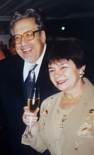 Лазарь и Валентина Берманы 2000-12-30